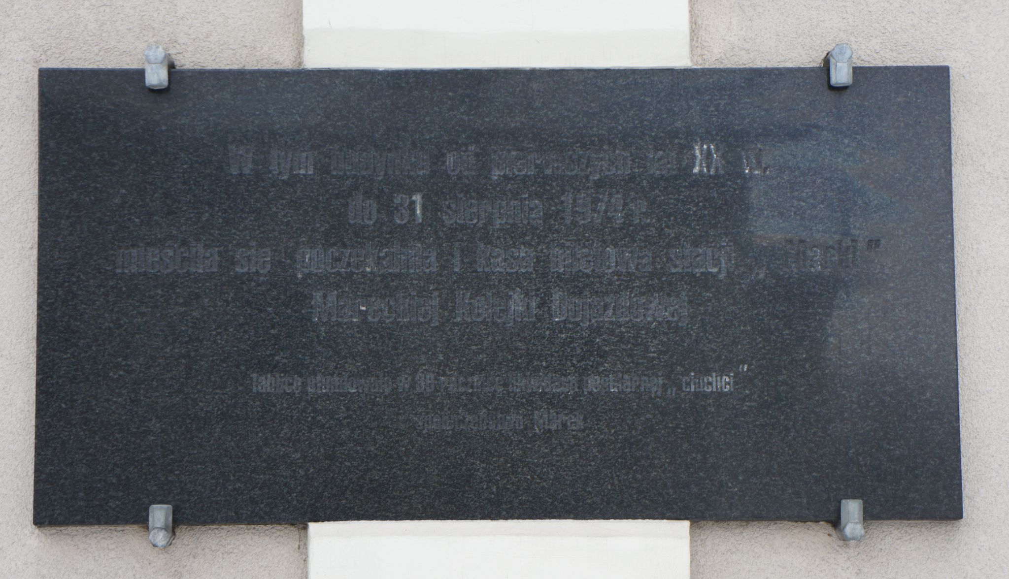 Tablica pamiątkowa w Markach poświęcona Mareckiej Kolei Dojazdowej.